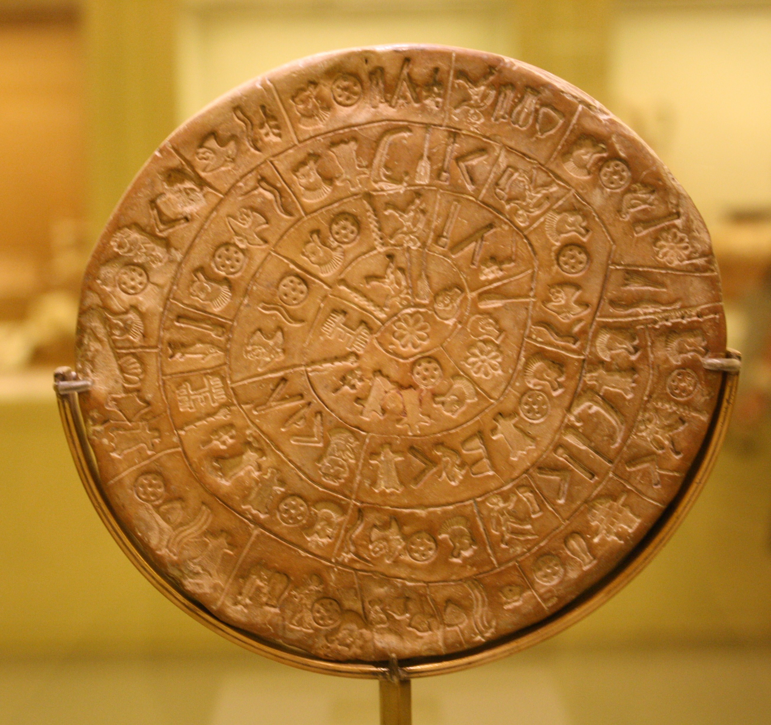 Le disque de Phaistos exposé au musée archéologique d'Héraklion en Crète, (Grèce). Face A.